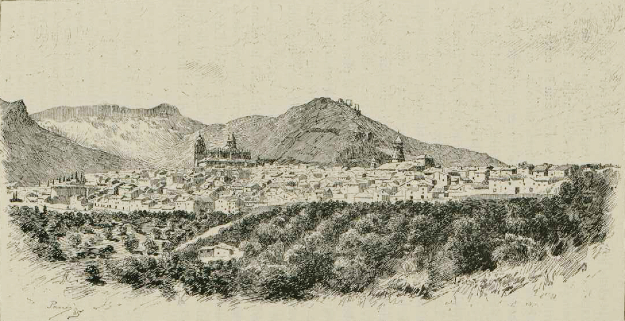 Jaén. La ciudad y sus cercanías